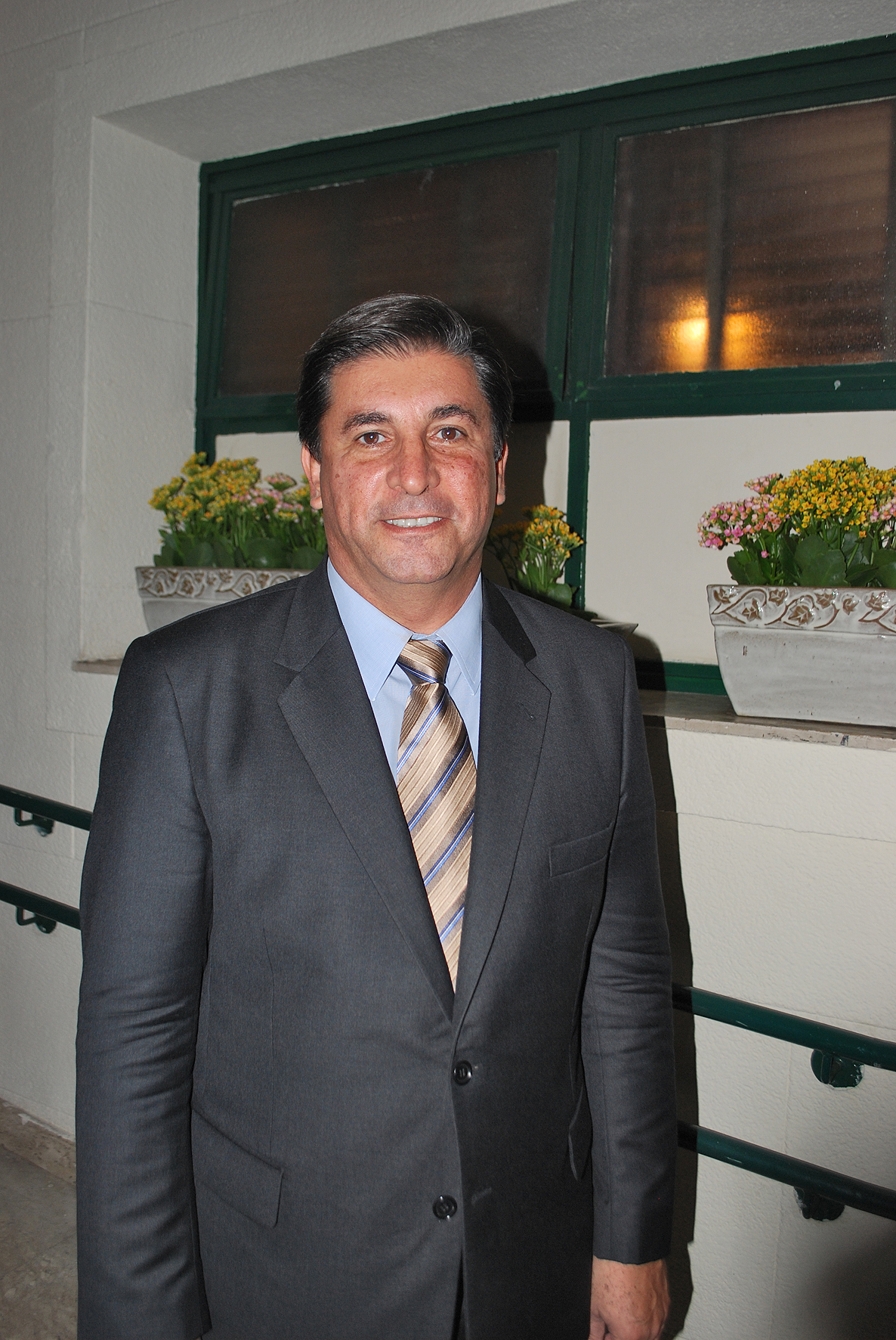 Carlos Nascimento